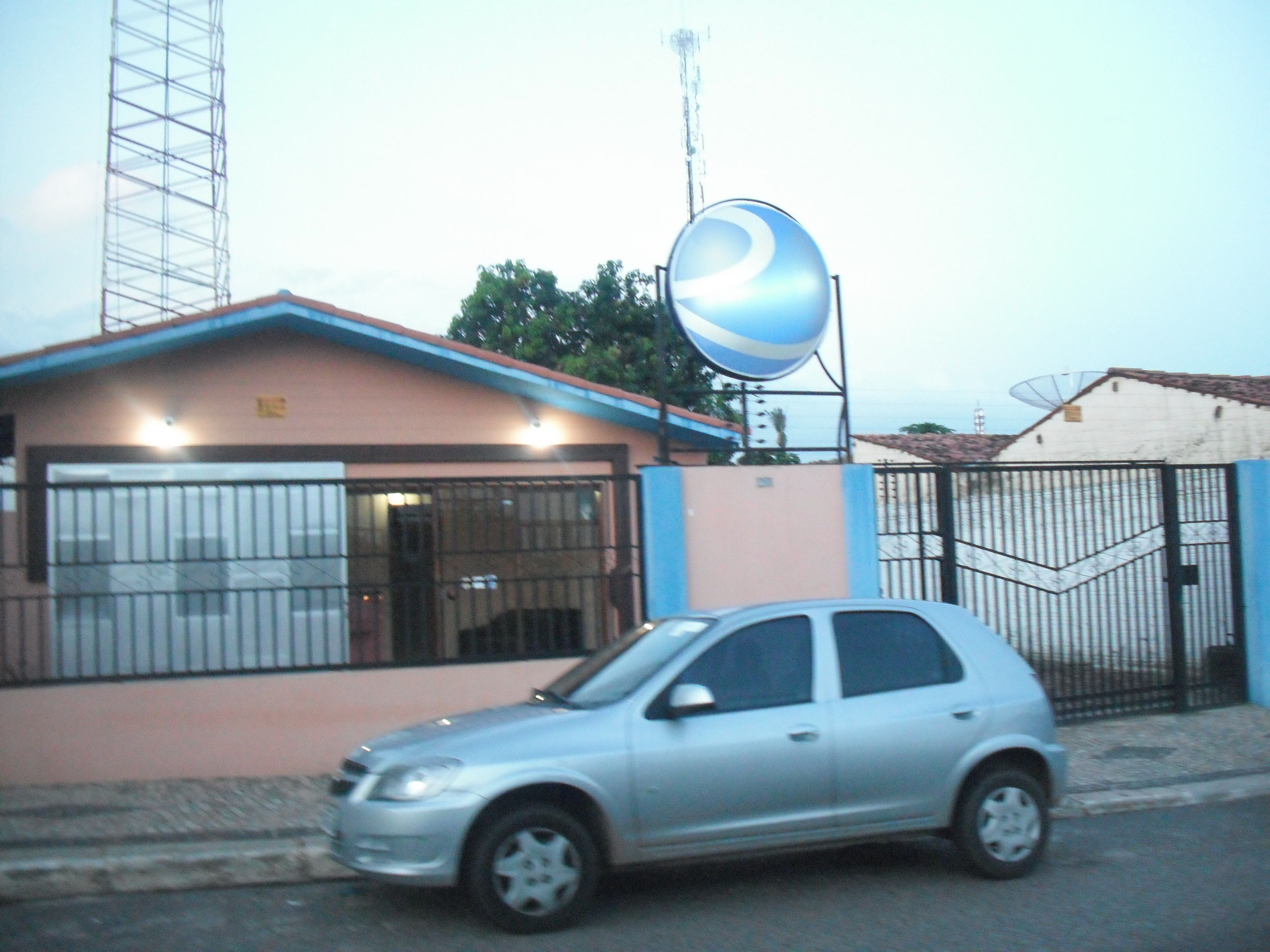 TV Remanso